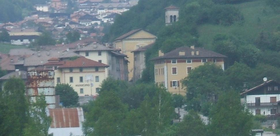 Lardaro, comune italiano.